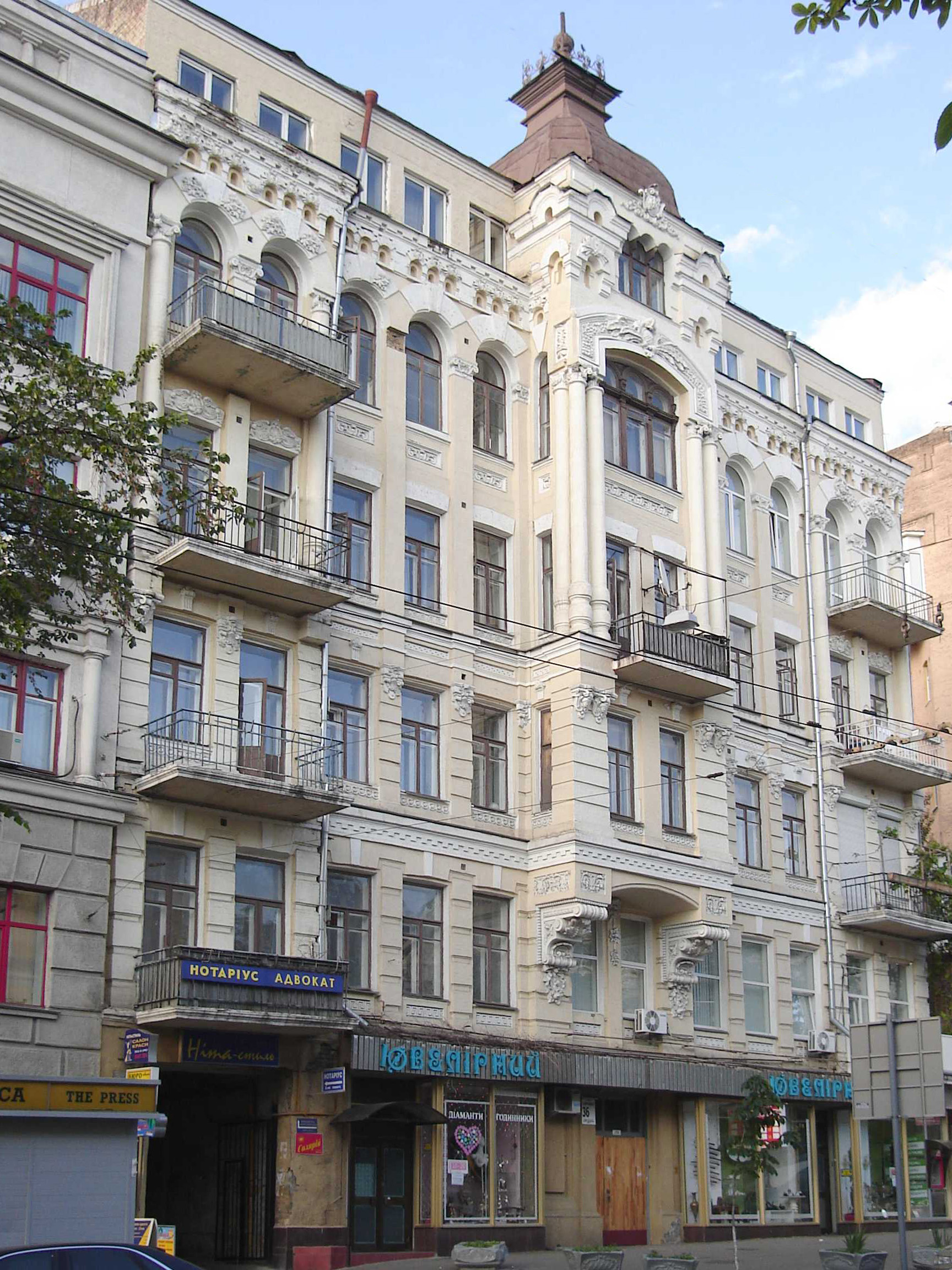 Дом по ул. Богдана Хмельницкого, 36 в Киеве